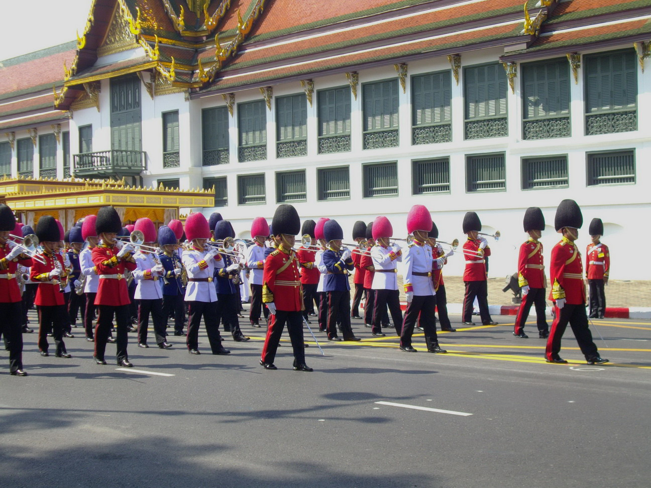 แถวทหารดุริยางค์จากกองดุริยางค์ทหารบกแต่งเครื่องแบบเต็มยศรักษาพระองค์ ในริ้วกระบวนเชิญพระศพสมเด็จพระเจ้าพี่นางเธอ เจ้าฟ้ากัลยานิวัฒนา กรมหลวงนราธิวาสราชนครินทร์ ริ้วกระบวนที่ 2 หน้าพระที่นั่งสุทไธสวรรยปราสาท ถนนสนามไชย วันที่ 15 พฤศจิกายน พ.ศ. 2551